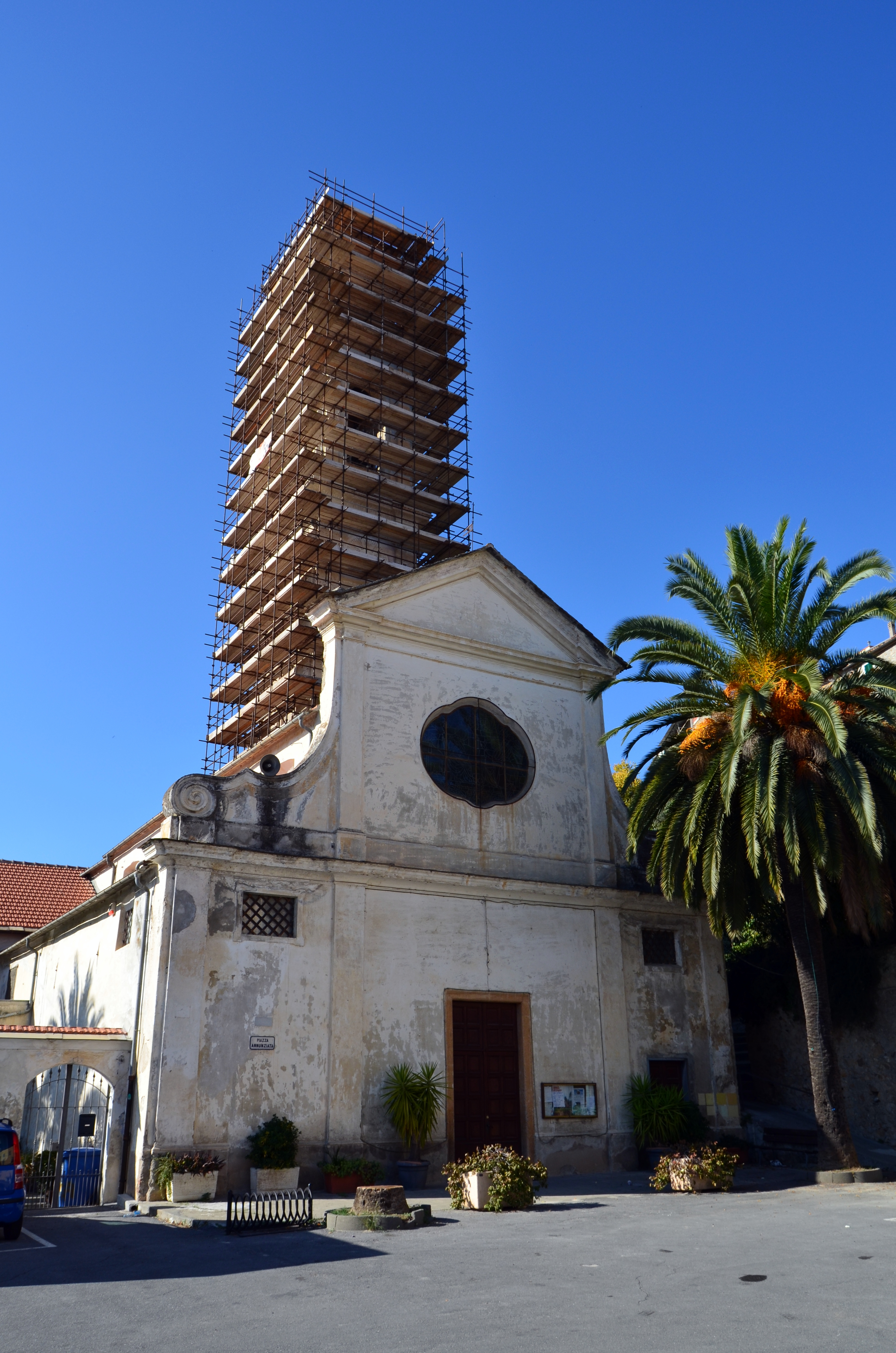 La chiesa della Santissima Annunziata, Bastia, Albenga, Liguria, Italia